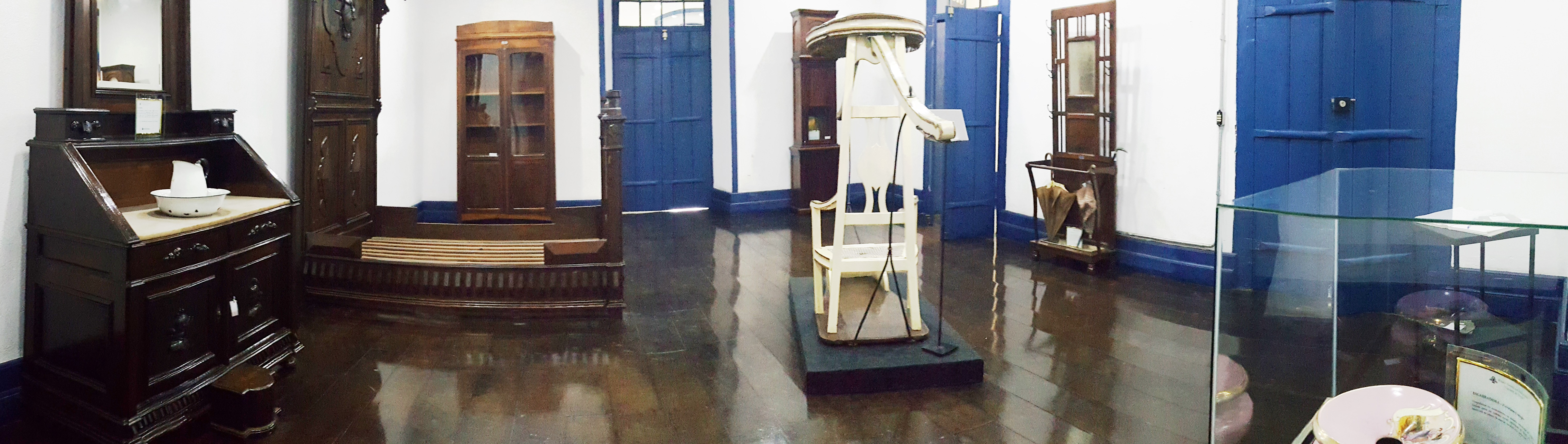 Acervo disposto em exposição de longa duração, destaque para a Cama do Conde de Sarzedas e Liteira; Museu Histórico e Pedagógico Visconde de Mauá, em Mogi das Cruzes.